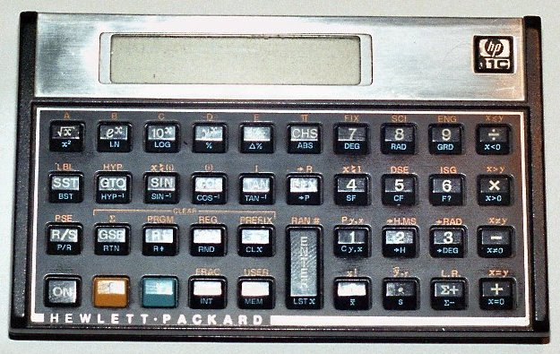 Ein alter Taschenrechner von 1981 in UPN